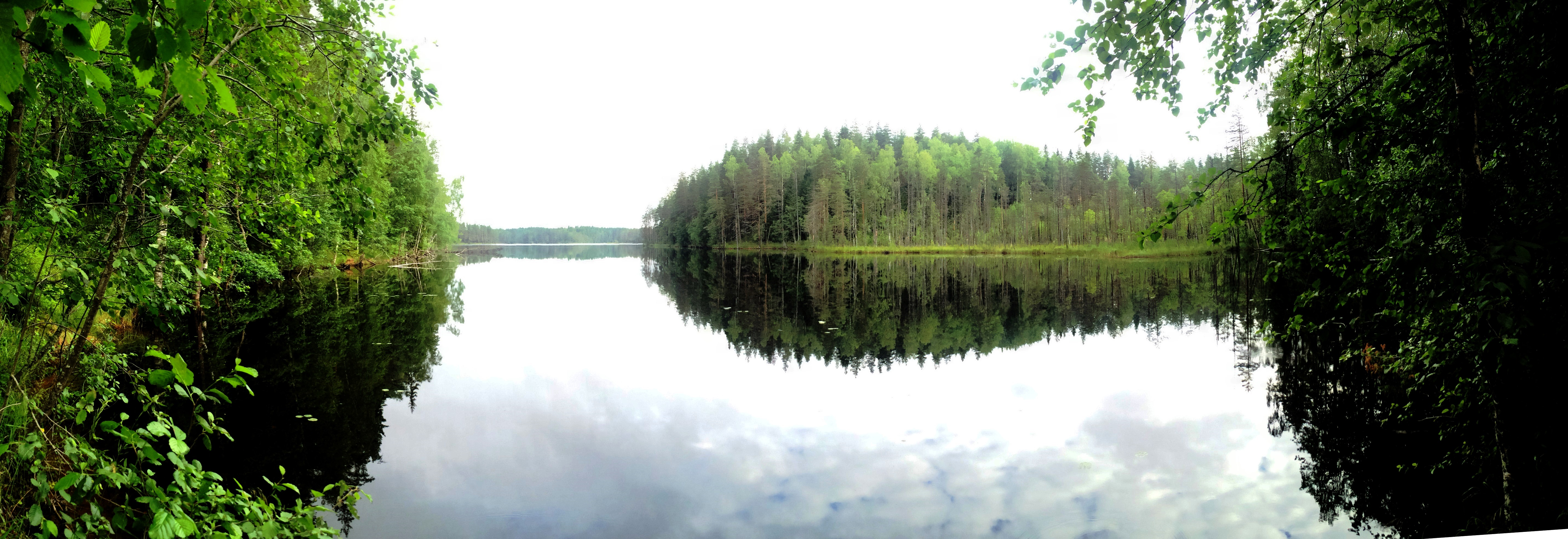 Сариярви (озеро, исток Саркайоки)